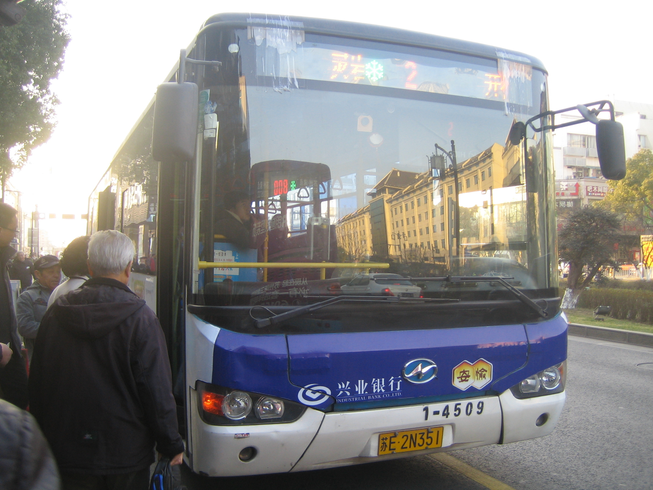 中文（中国大陆）: 苏州公交2路，此为原68路用车，型号为海格KLQ6129GHEV